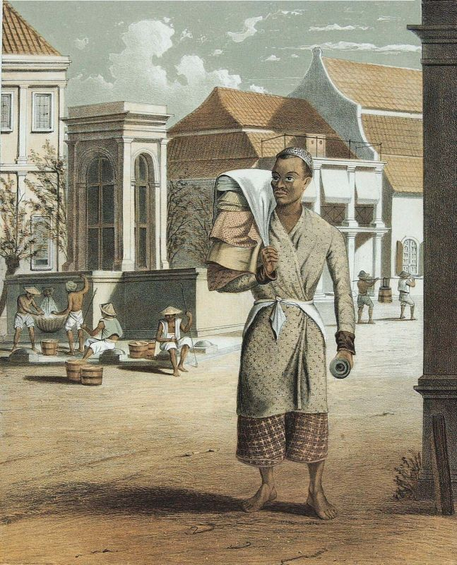 Litho. Litho naar een oorspronkelijke tekening van A. van Pers. Serie van losse gelithografeerde platen.. Een Arabier